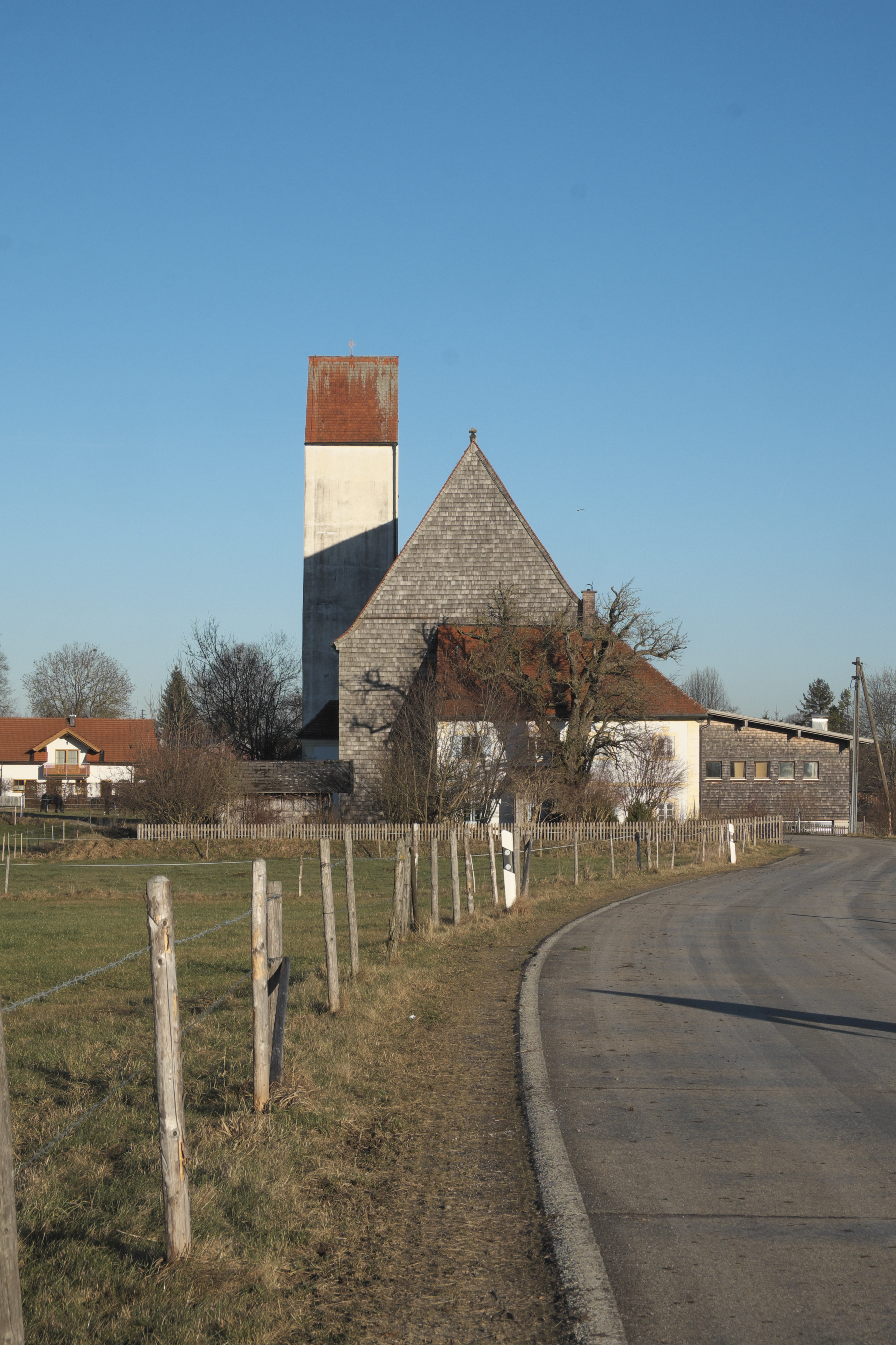 Ehemalige Wallfahrtskirche, heute katholische Filialkirche St. Anna in Burggen im oberbayerischen Landkreis Weilheim-Schongau (Bayern/Deutschland)